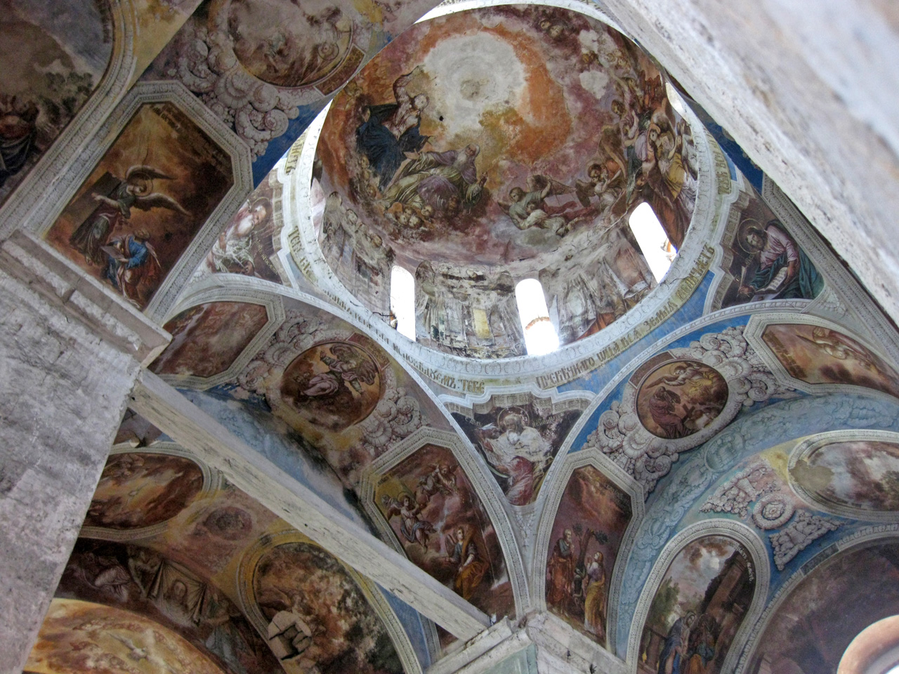 Собор Георгиевский (Георгиевский собор и земляные валы городища) (Владимирская область, Юрьев-Польский, улица 1 Мая)